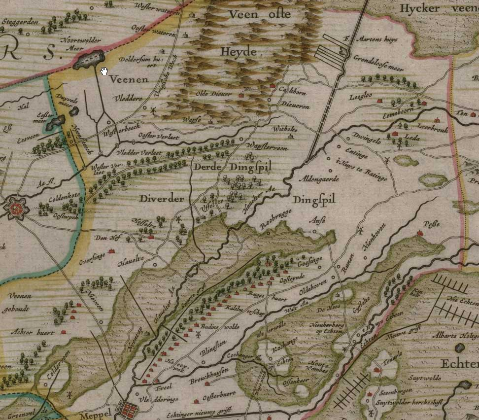 Oude kaart van Drenthe uit 1634 (fragment)